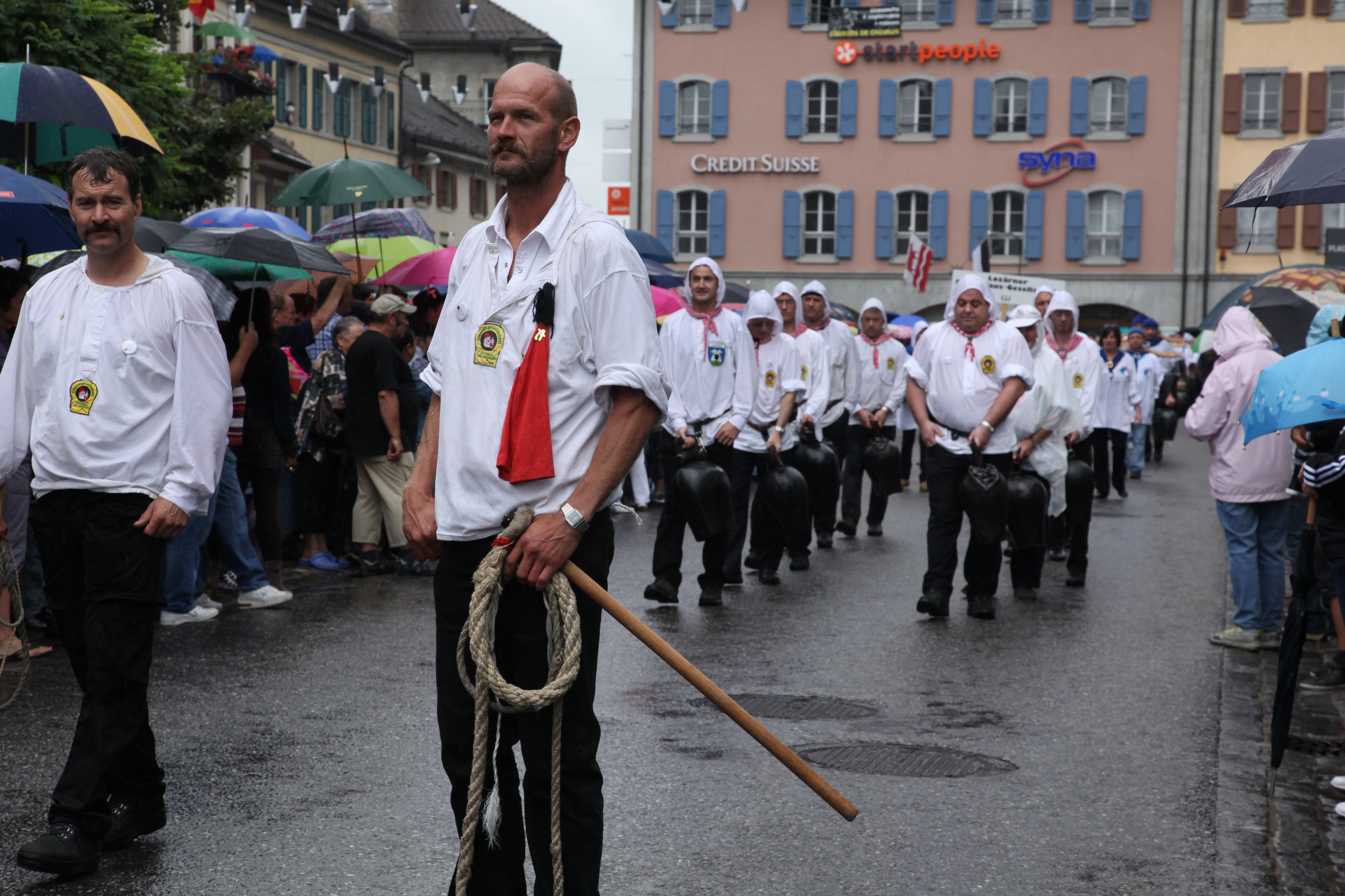 Instantanés de la Fête fédérale des sonneurs de cloches à Bulle (canton de Fribourg en Suisse). Le cortège du 4 septembre 2011. Photo: Pierre Schwaller